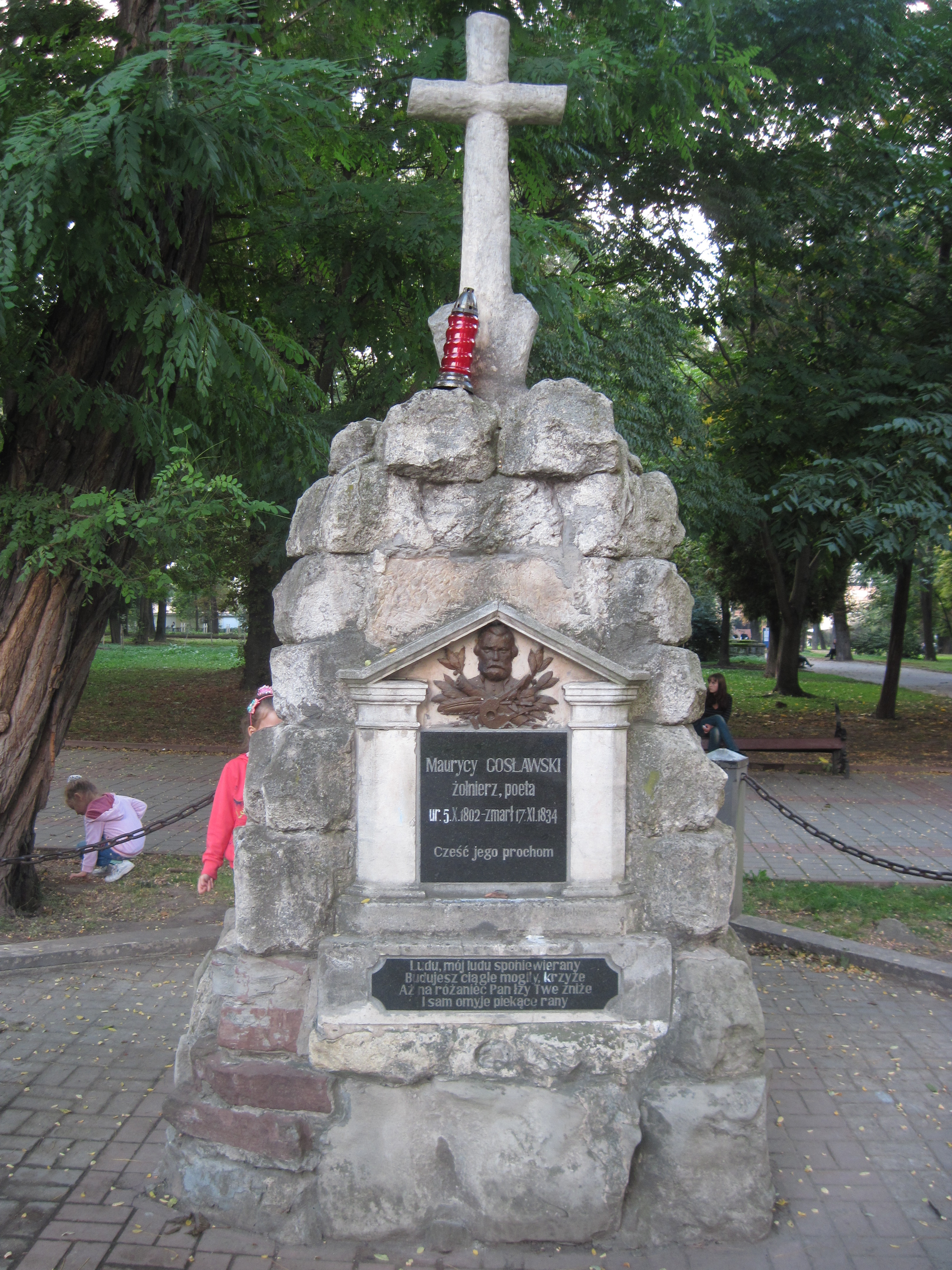 Маврикий Гославский (1802—1834) — польский поэт романтического направления.